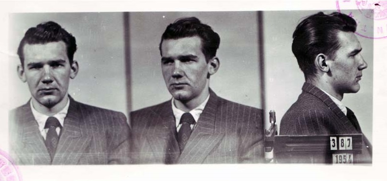 Vazební fotografie Zbyňka Janaty (zdroj: ABS).